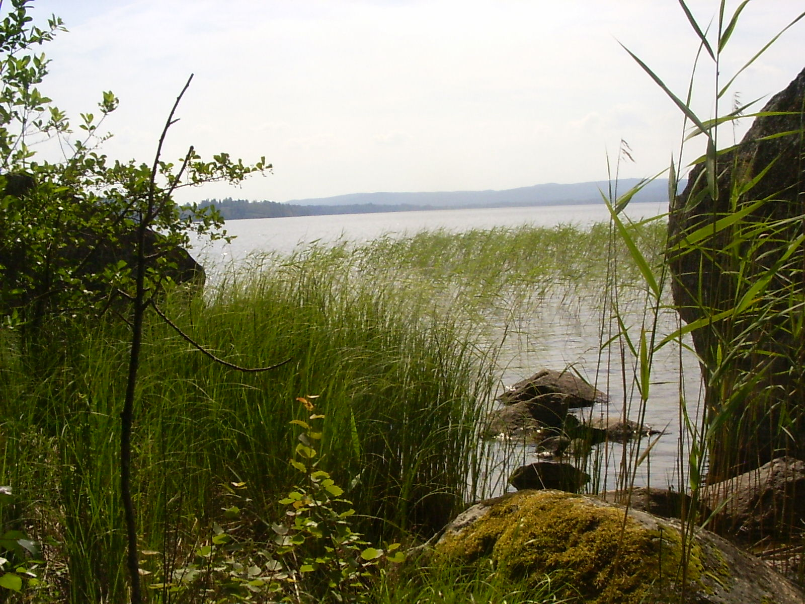 Gemeente Hagfors, noordelijke toegang tot Lakenesjön